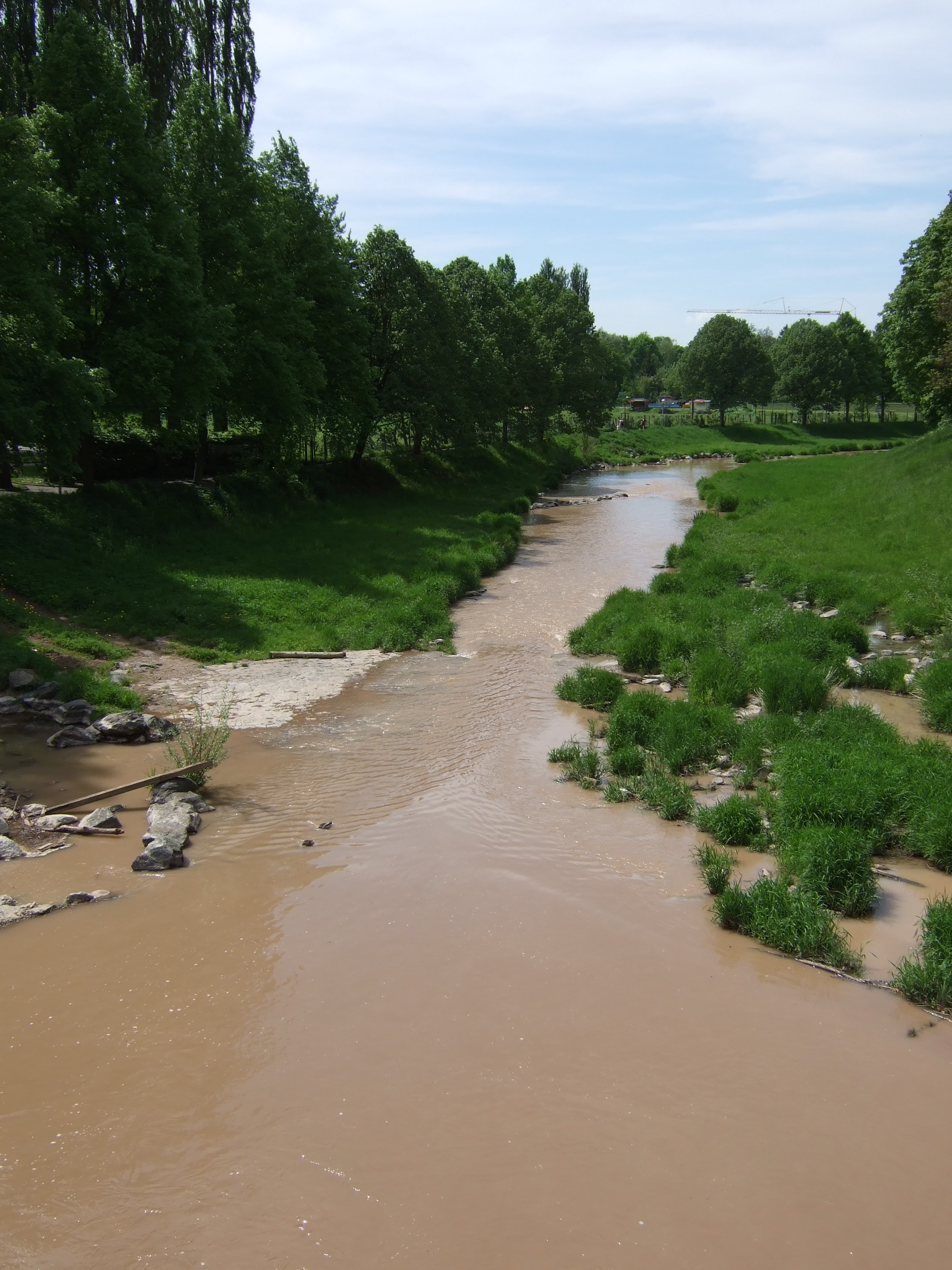 Roter Main Bayreuth Friedrich-Ebert-Straße